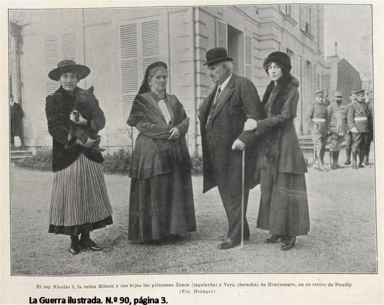 Nicola I del Montenegro con la moglie Milena e le figlie Xenia (a sinistra) e Vera (a destra) a Neuilly-sur-Seine